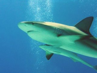 tubarãoerêmora